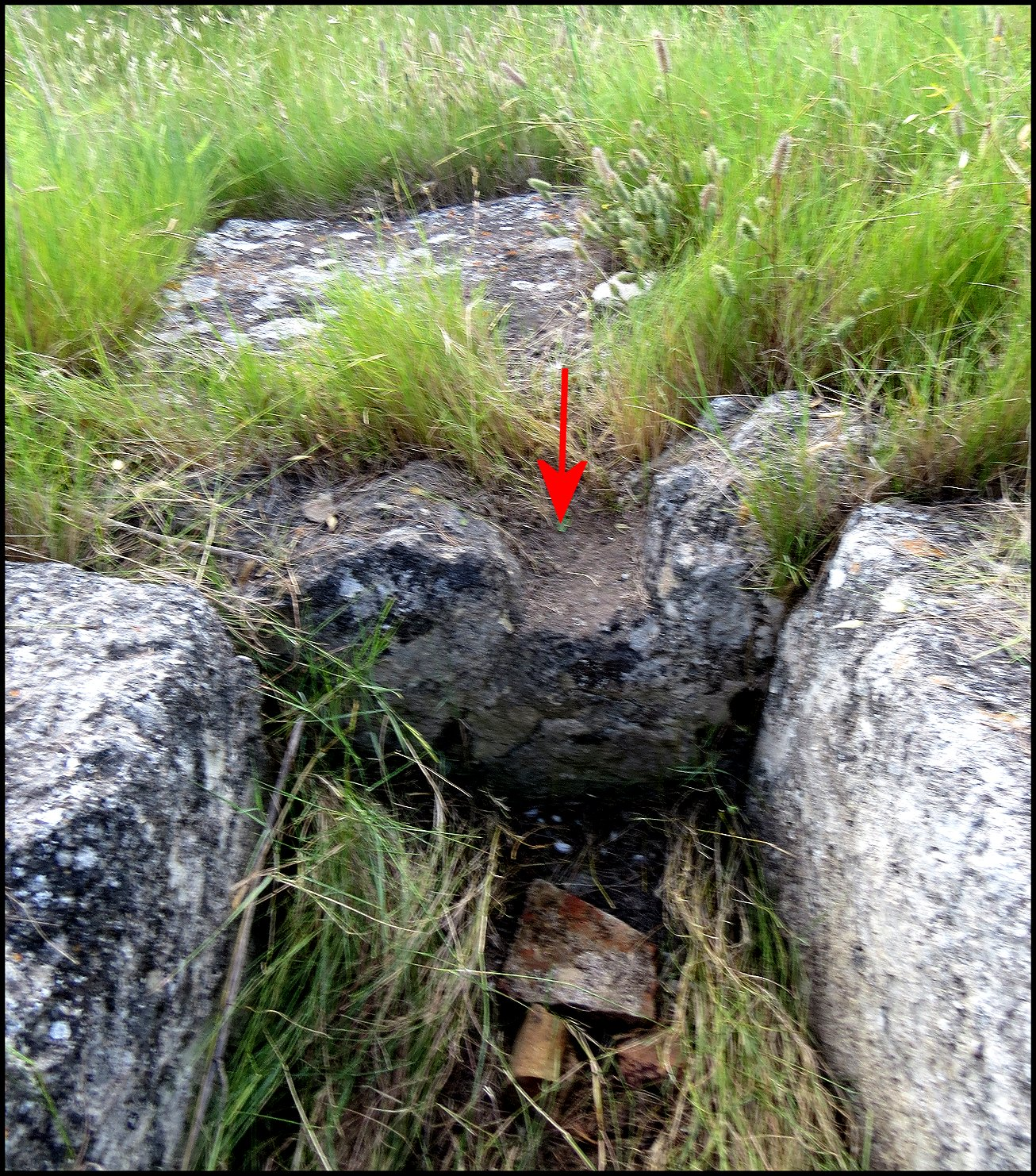 Villa de Vivios (Lespignan, Occitanie).Canalisation annexe (D4?) à l'origine du grand collecteur occidental C1